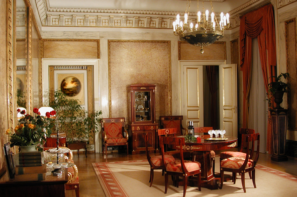 Apartament Grand Hotel Kraków